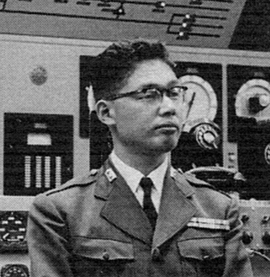 アメリカ空軍の技術開発センターを視察する高山捷一